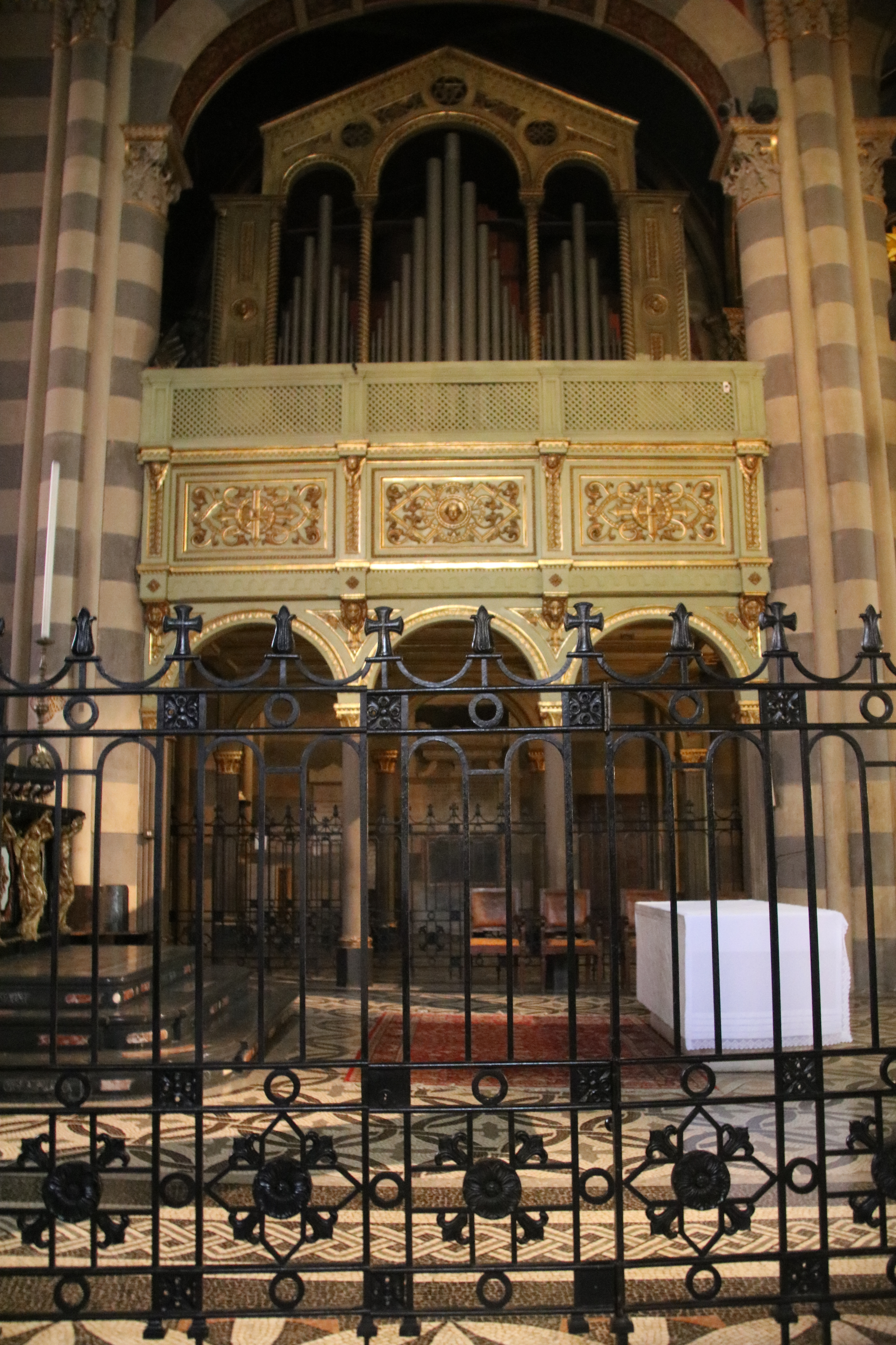 duomo di Sant'Evasio This is a photo of a monument which is part of cultural heritage of Italy.